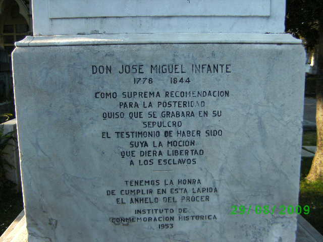 Lápida de José Miguel Infante en el Cementerio General de Santiago de Chile